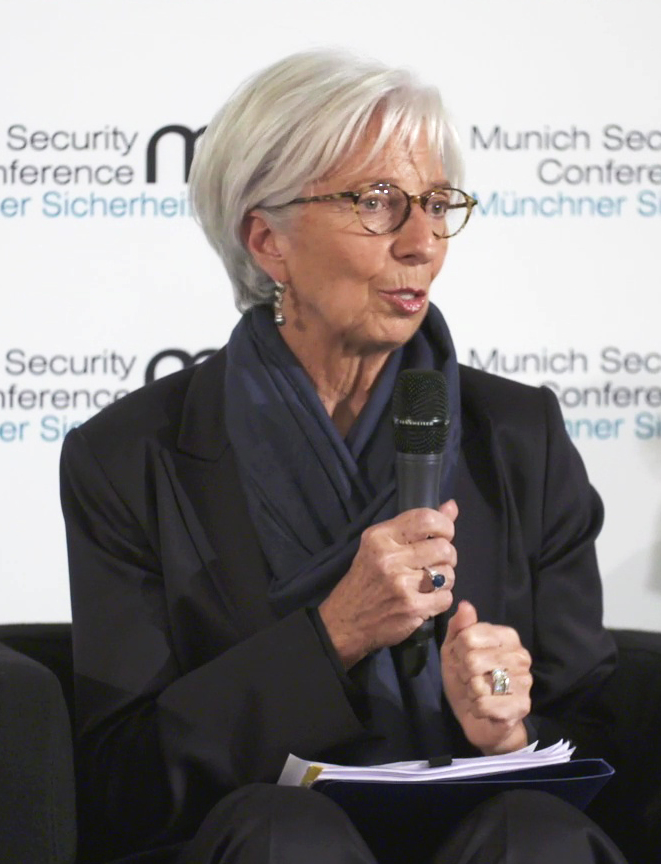 Christine Lagarde während der Münchener Sicherheitskonferenz 2018